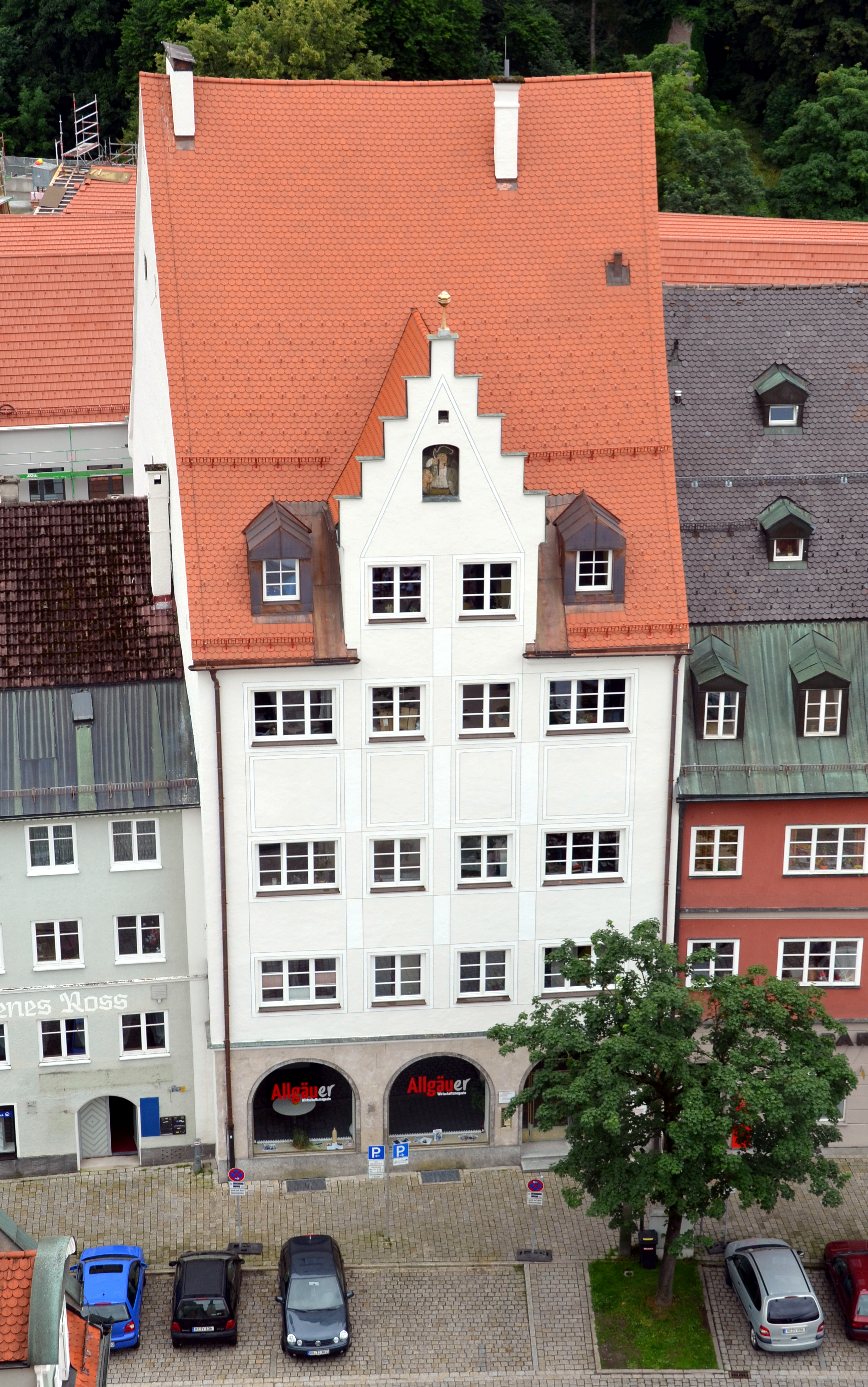 Jenischhaus in Kempten